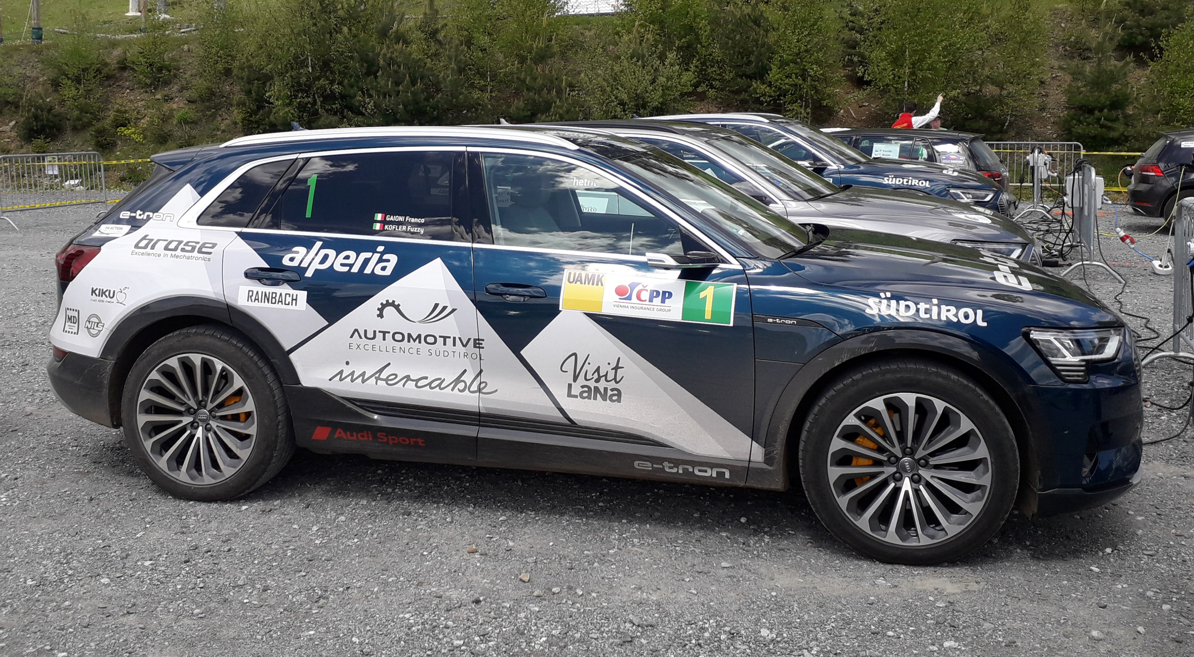 La Audi e-tron della scuderia Audi Team Autotest Motorsport al Czech New Energies Rallye 2019